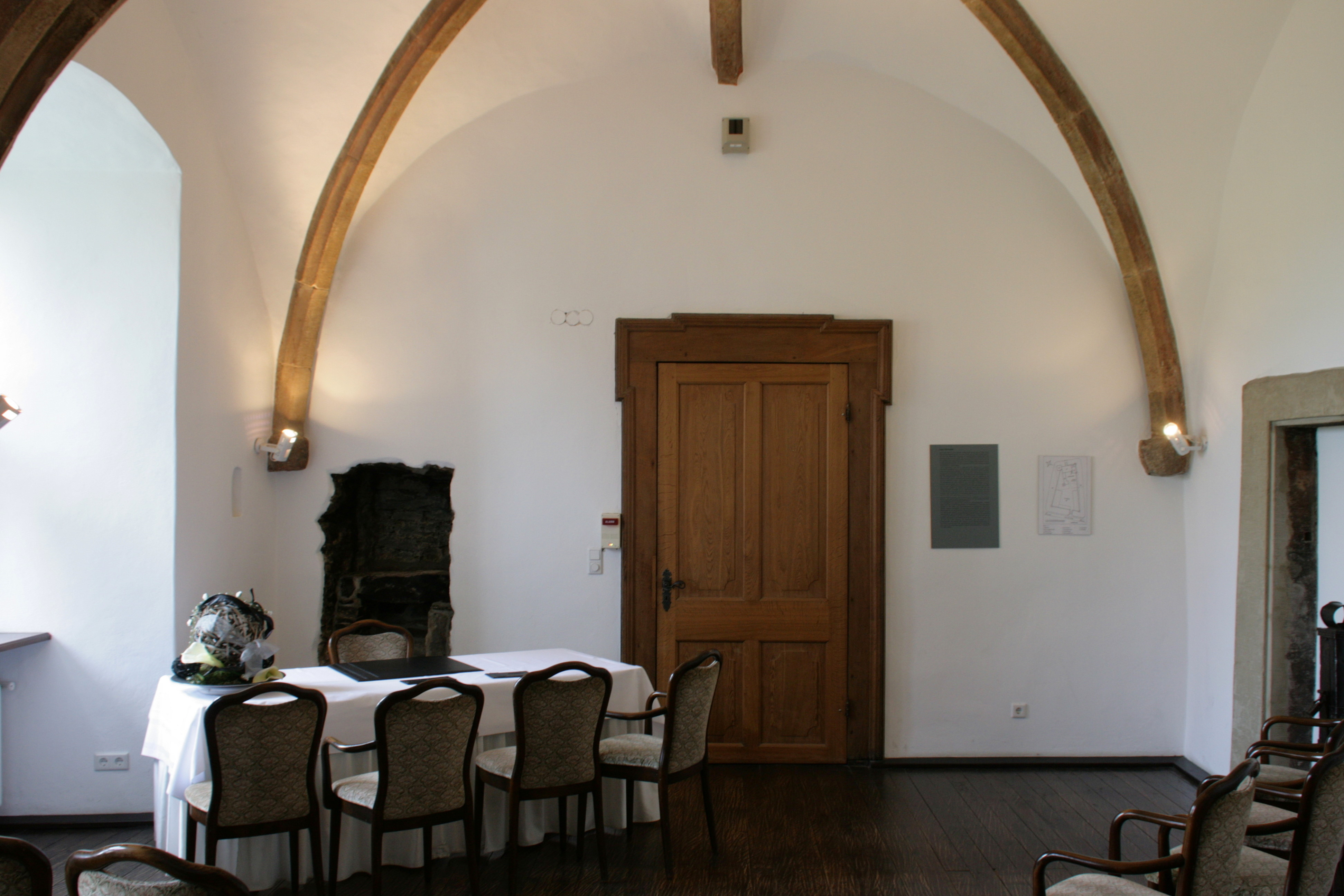 Haus Kemnade, An der Kemenade 10 in Hattingen-Blankenstein